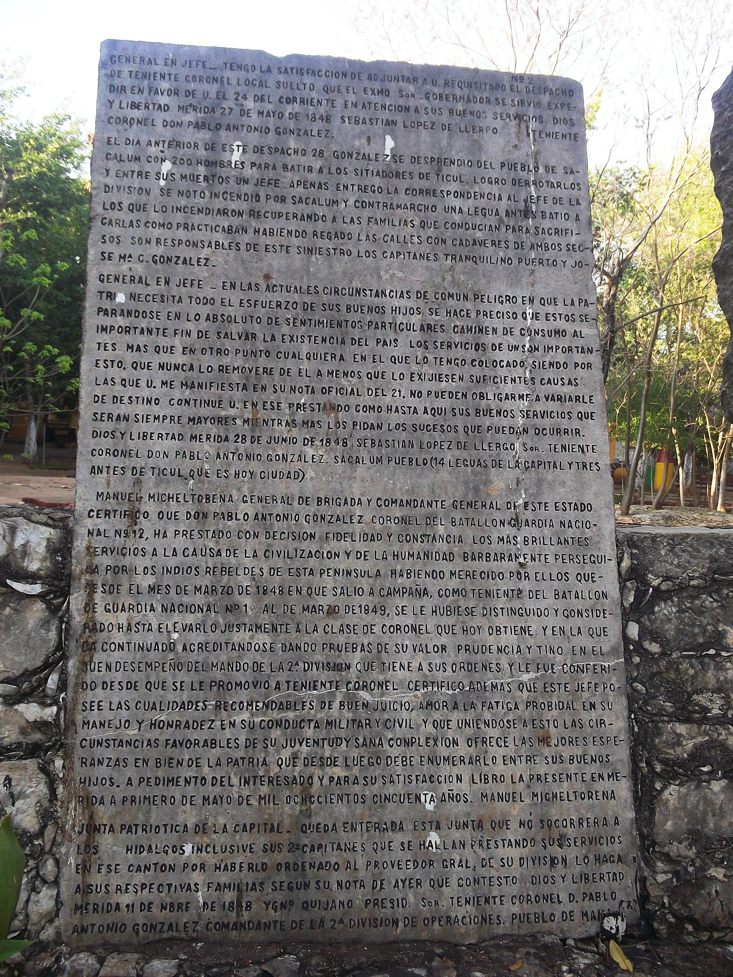 Parque Zoológico del Centenario en Mérida, Yucatán.